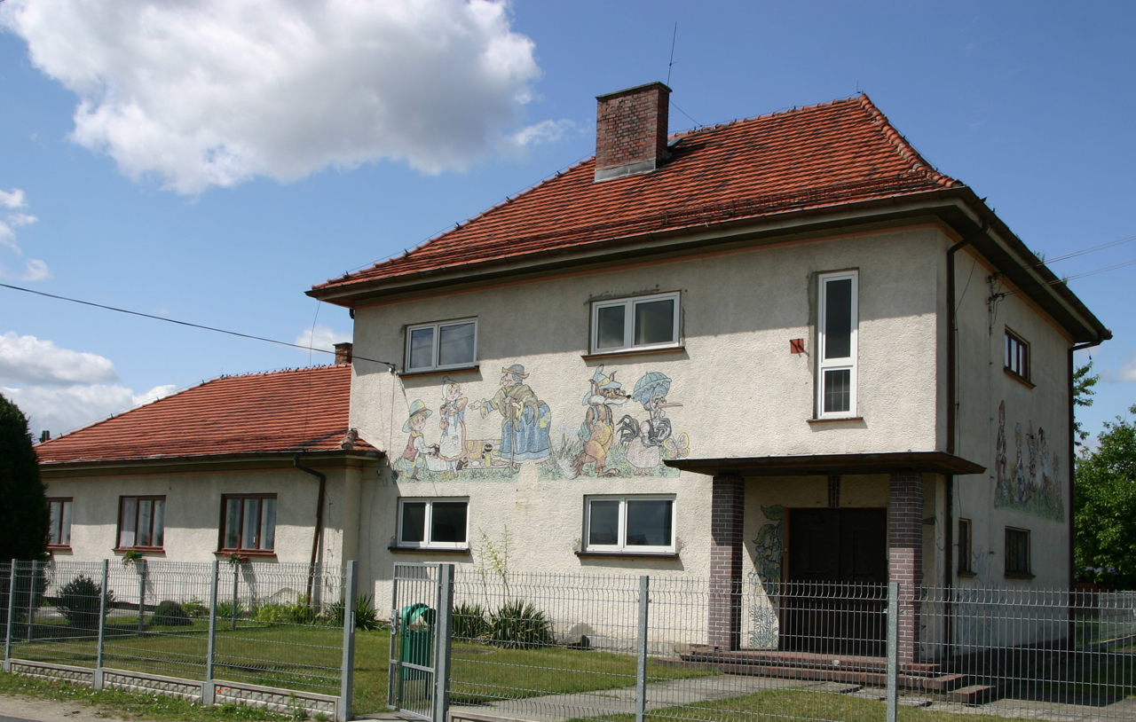 Odrowąż (dodatkowa nazwa w j. niem. Oderwanz, 1936-45 Oderhöh) – wieś w Polsce położona w województwie opolskim, w powiecie krapkowickim, w gminie Gogolin.